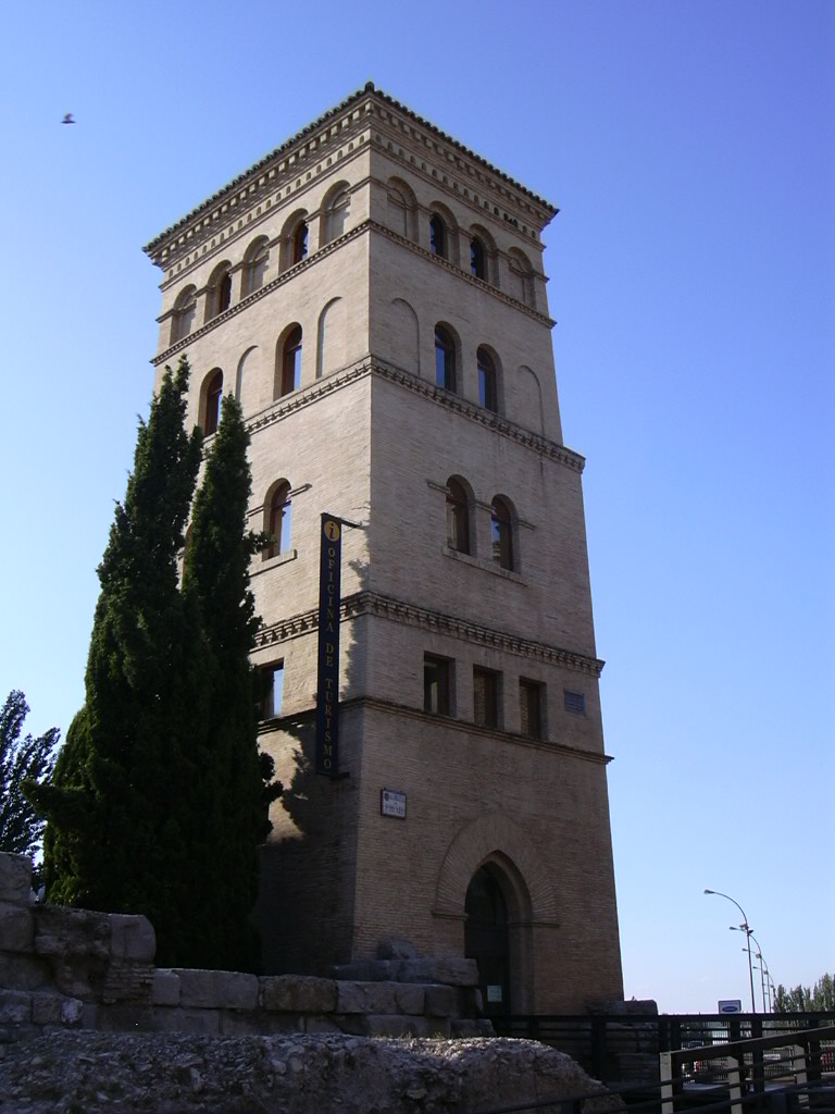 Torreón de la Zuda, Zargoza